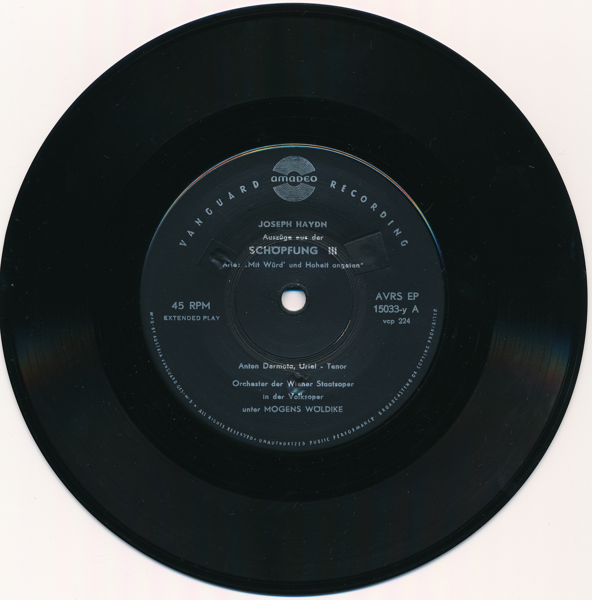 Single-Schallplatte des Plattenlabels Amadeo